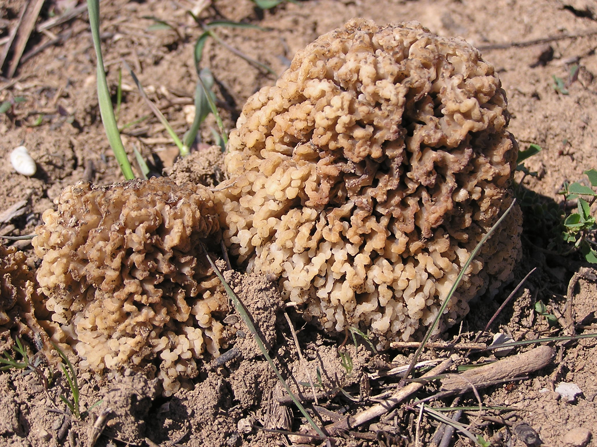 Гриб в Донецке